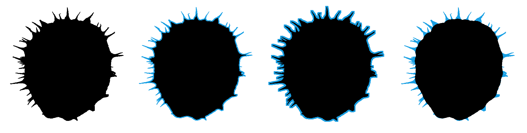 Binärbild einer Kastanie das erodiert, dilatiert und geöffnet wurde